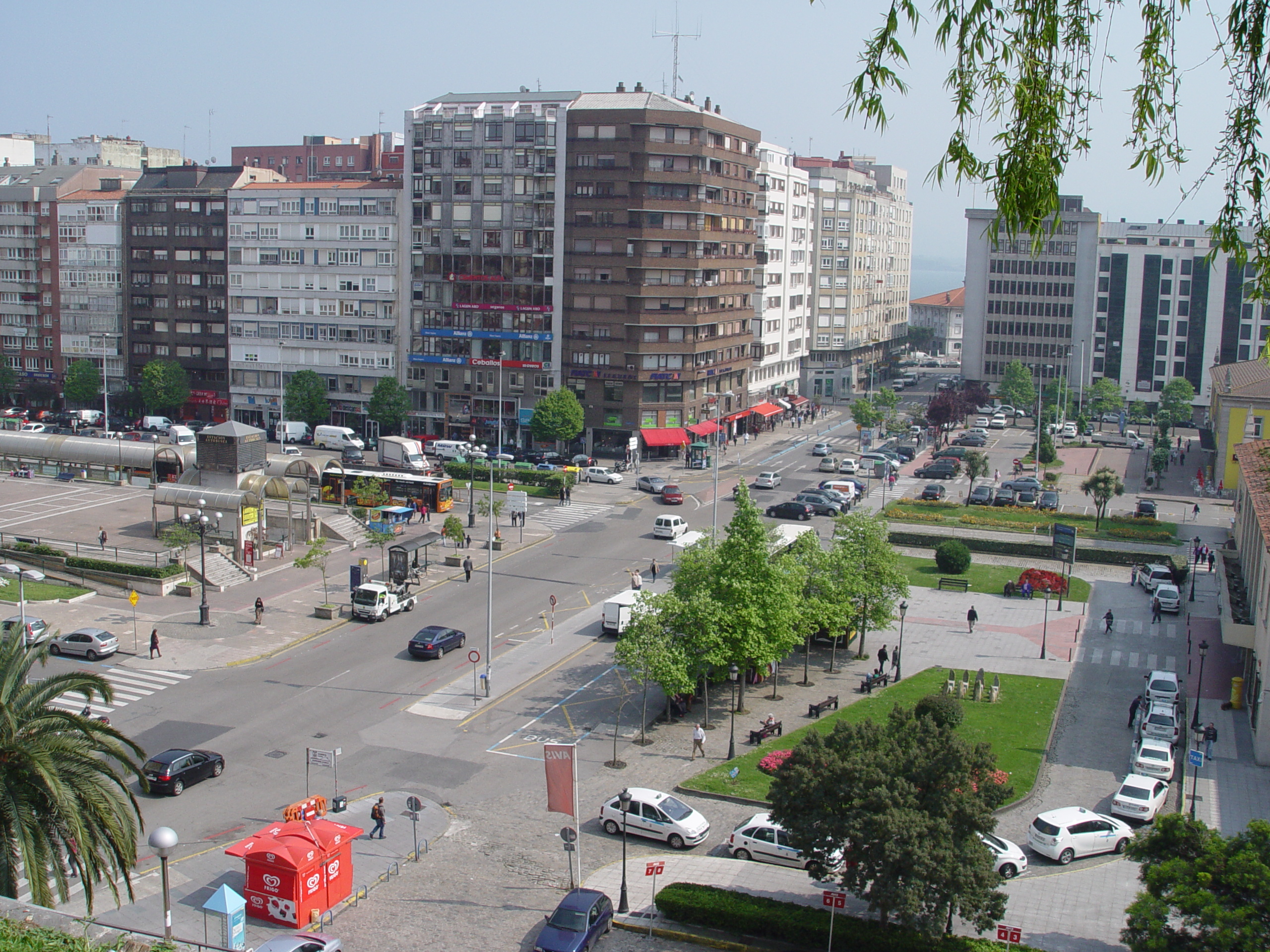 Estaciones. Santander. Cantabria. Spain. Europe